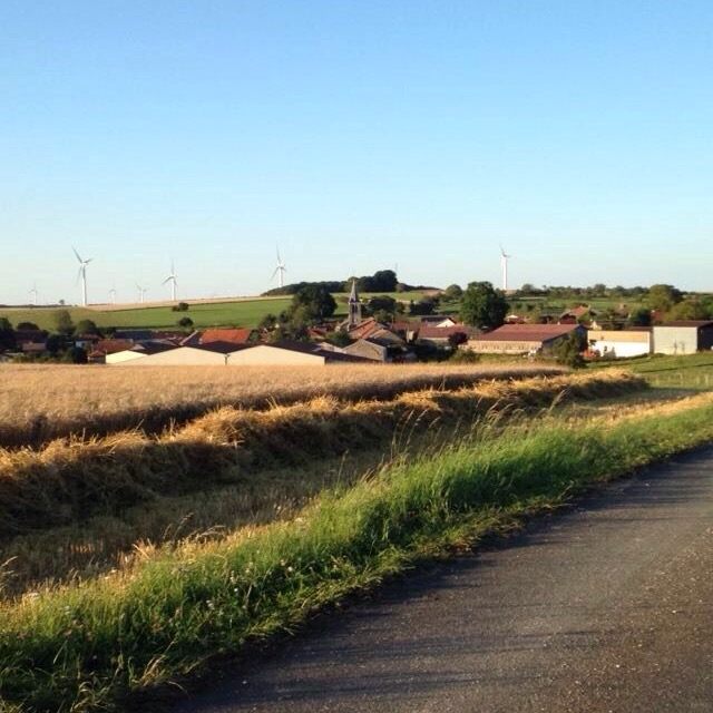 Vue de chermisey